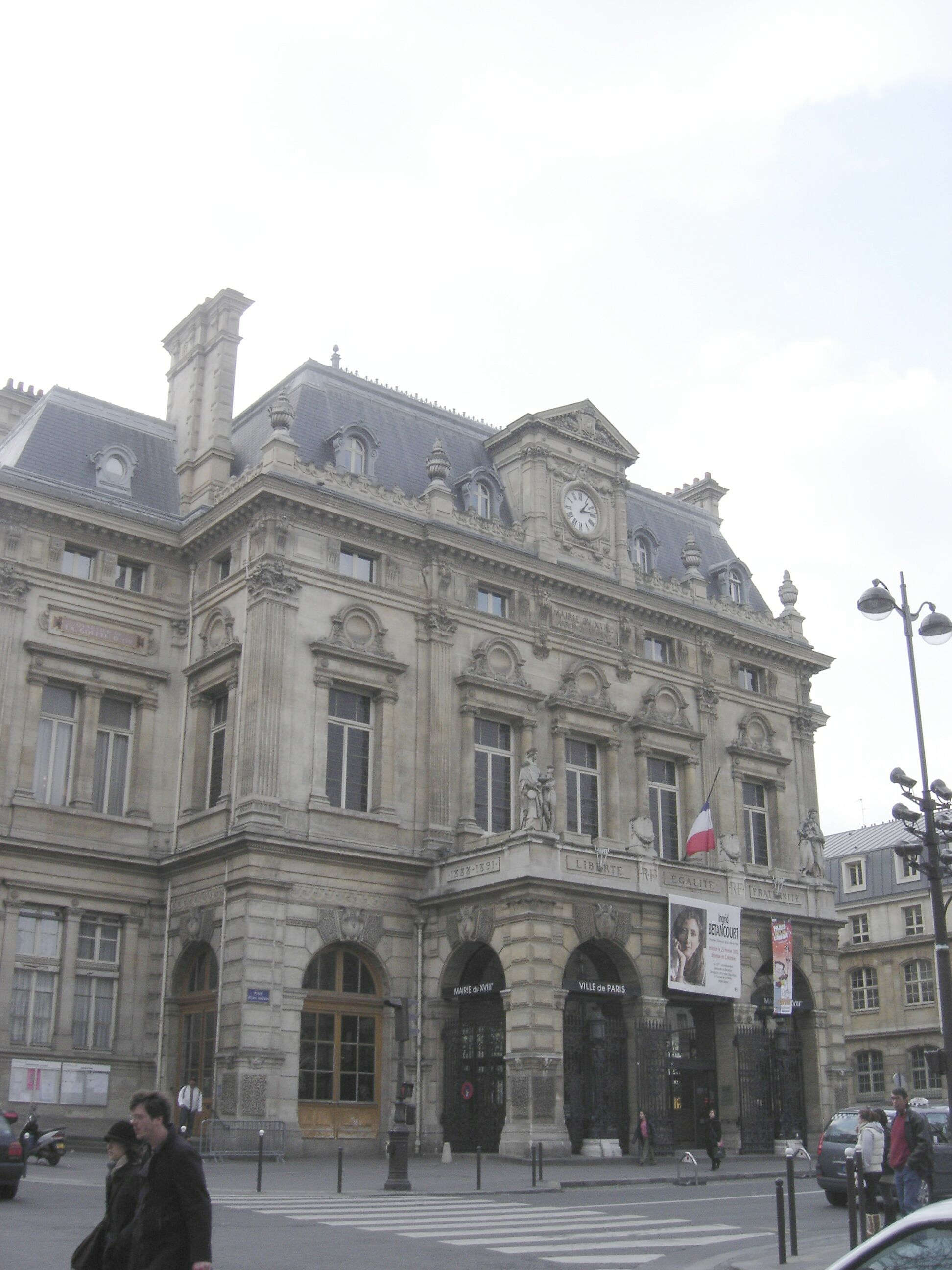 Mairie du XVIIIe arrondissement de Paris